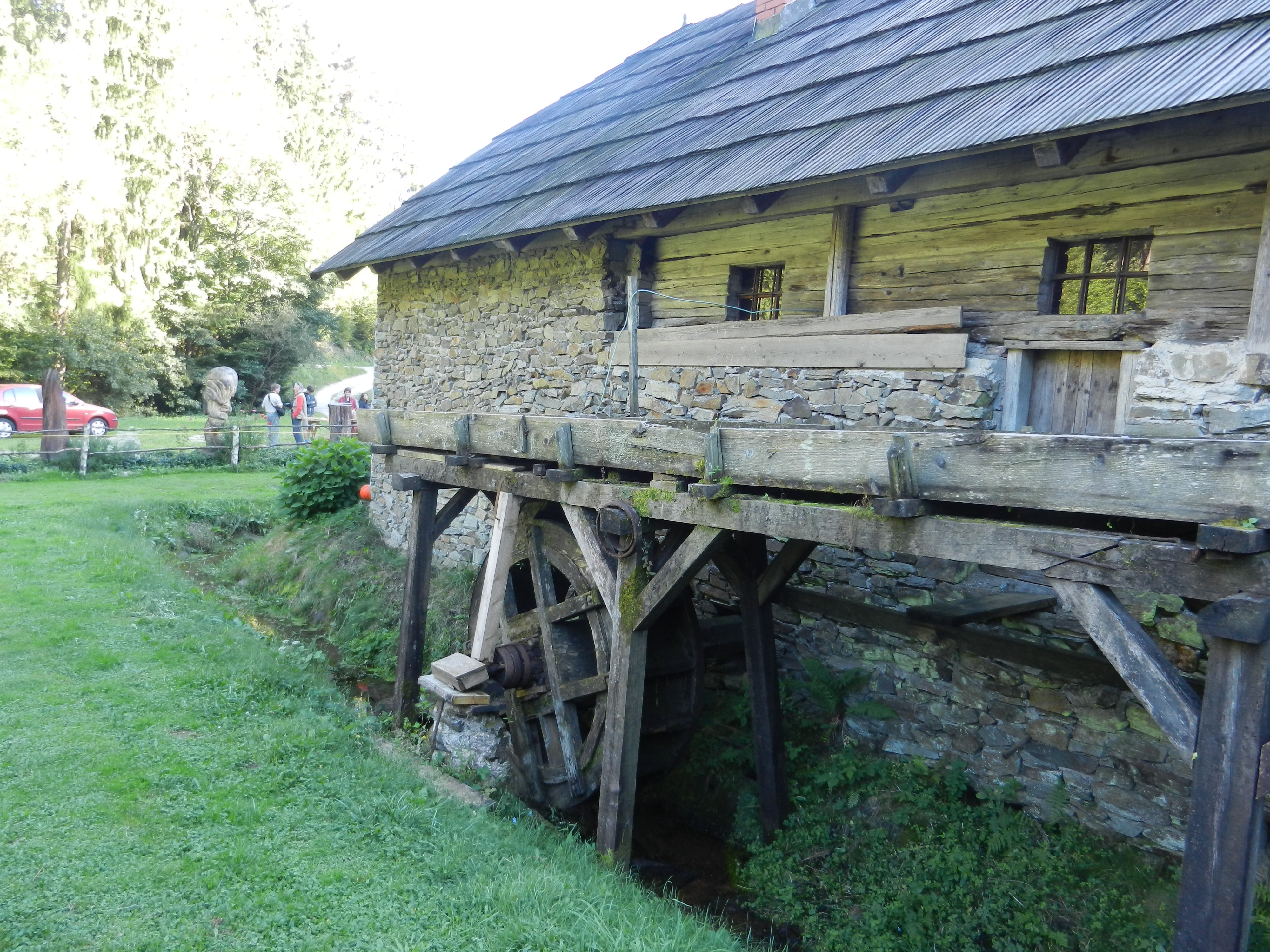 Povhov mlin v Dolgih Brdih